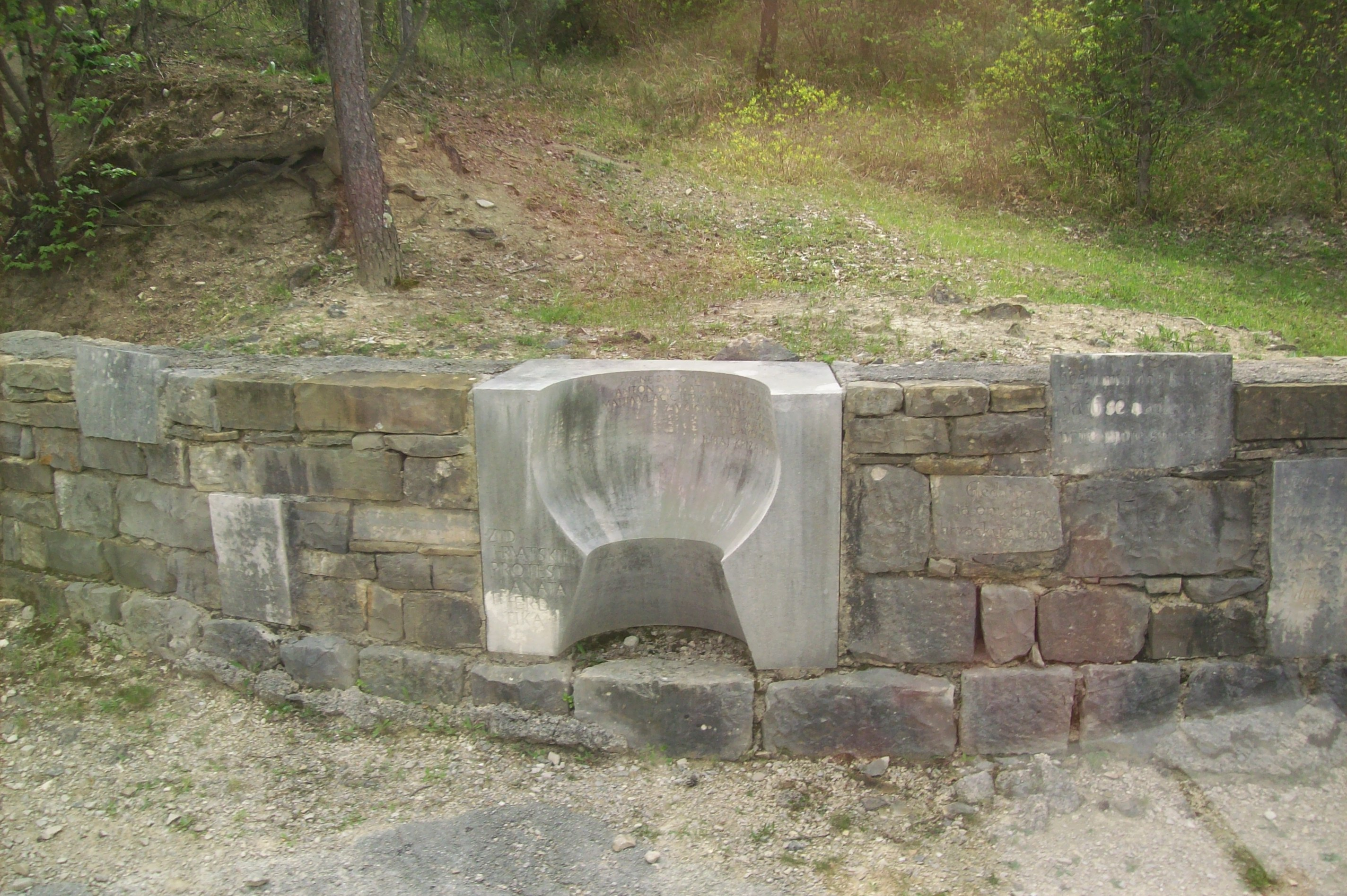 Zid hrvatskih protestanata i heretika, Aleja glagoljaša, Istra, Hrvatska